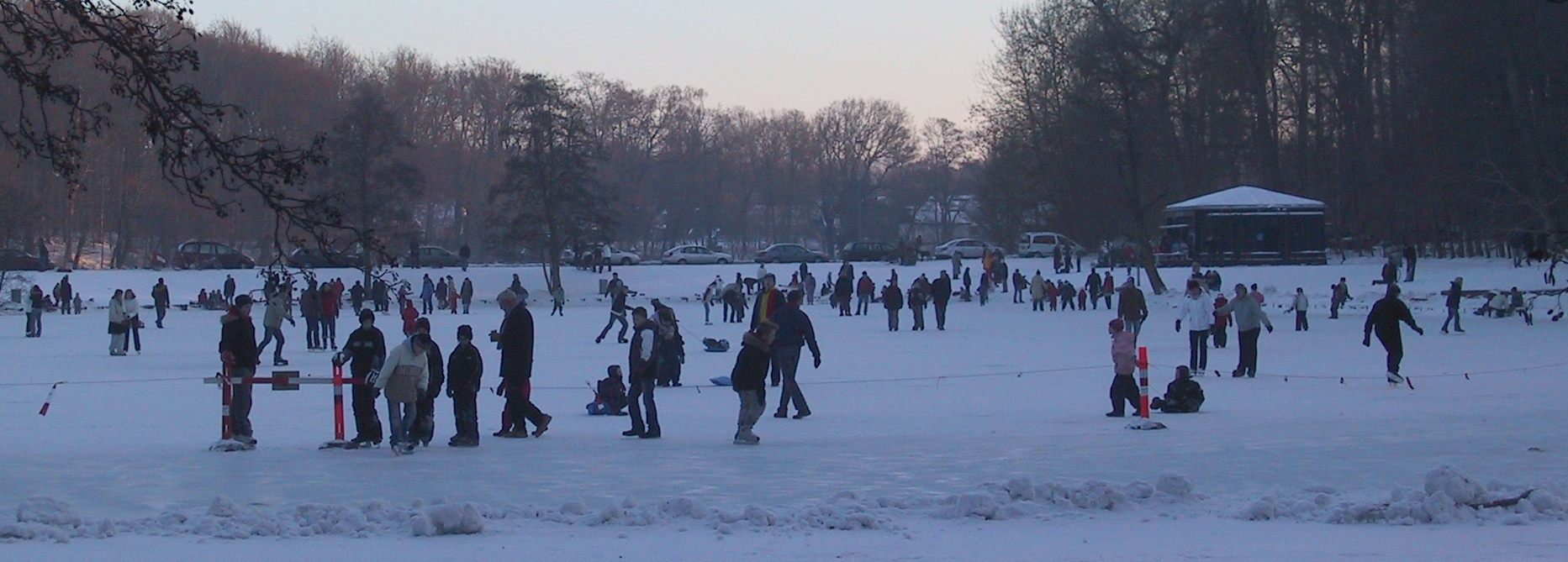 Winter at Skovsøen in Fruens Bøge, Odense, Denmark.